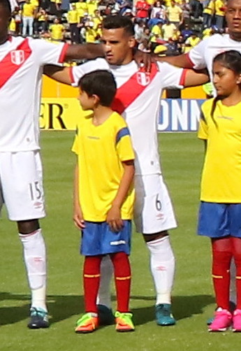 Quito 5 Sep (Andes).- Encuentro por eliminatorias Rusia 2018 entre Ecuador y Perú. Fotografías: Carlos Rodríguez/Andes.